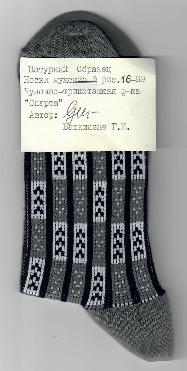 kojinės